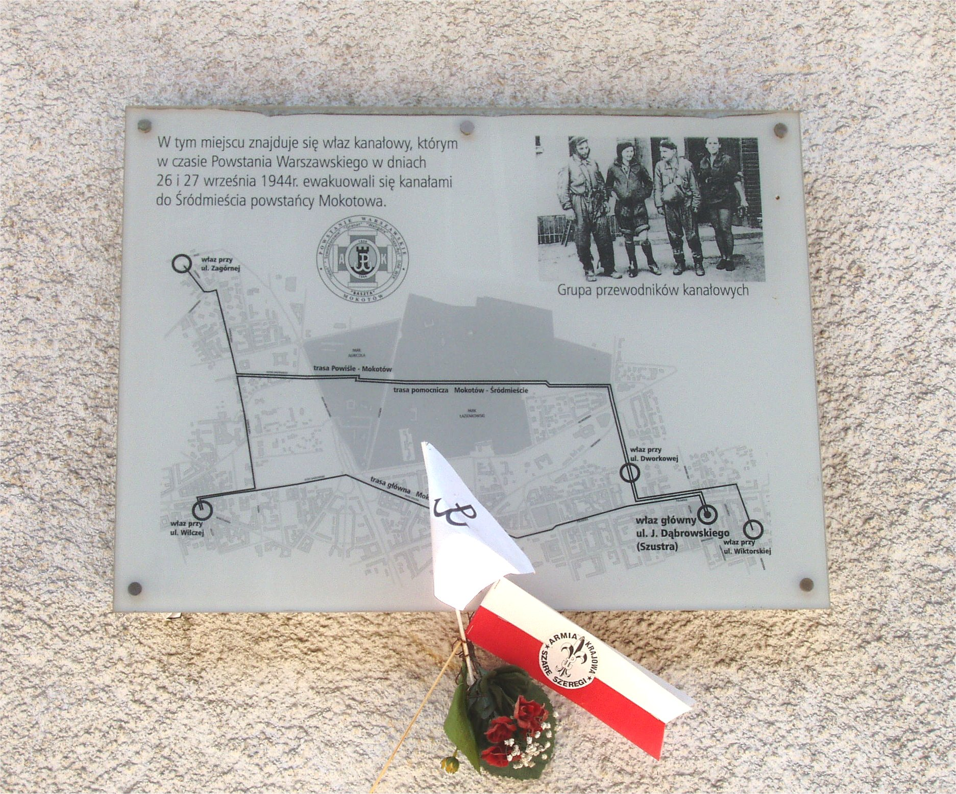 Przy ul. Dąbrowskiego w Warszawie (fot Zu)